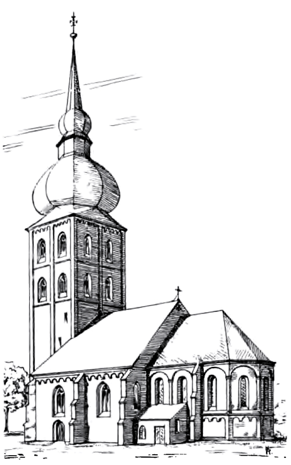 Zeichnung der ehemaligen Kirche St. Georg in Soest. Bildbeschreibung von Ludorff: Südostansicht nach einer Abbildung im Besitze der Stadt.